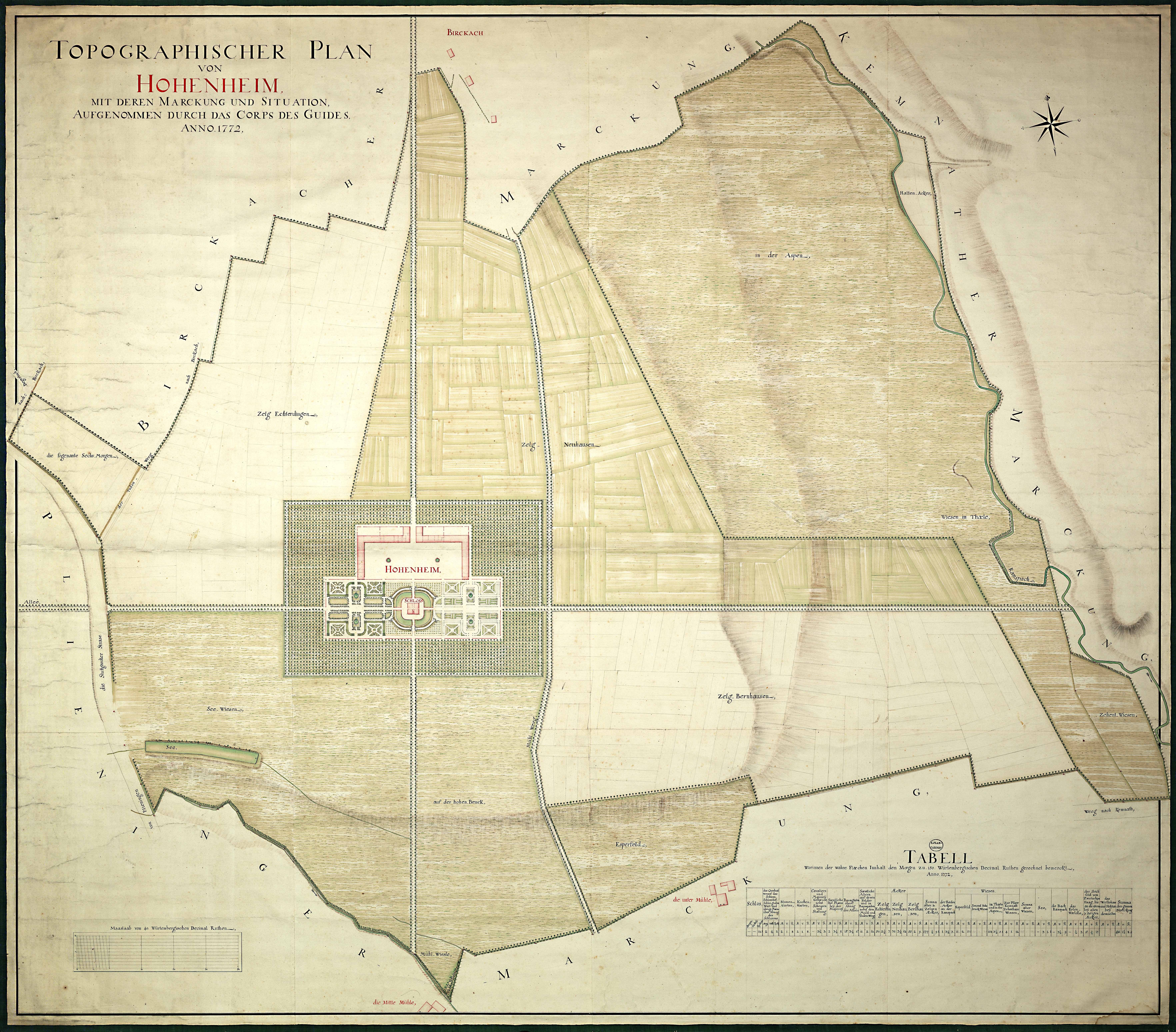 Plan von Schloss Hohenheim mit Gartenanlage, 1772 (HStAS N 5 Nr. 19)